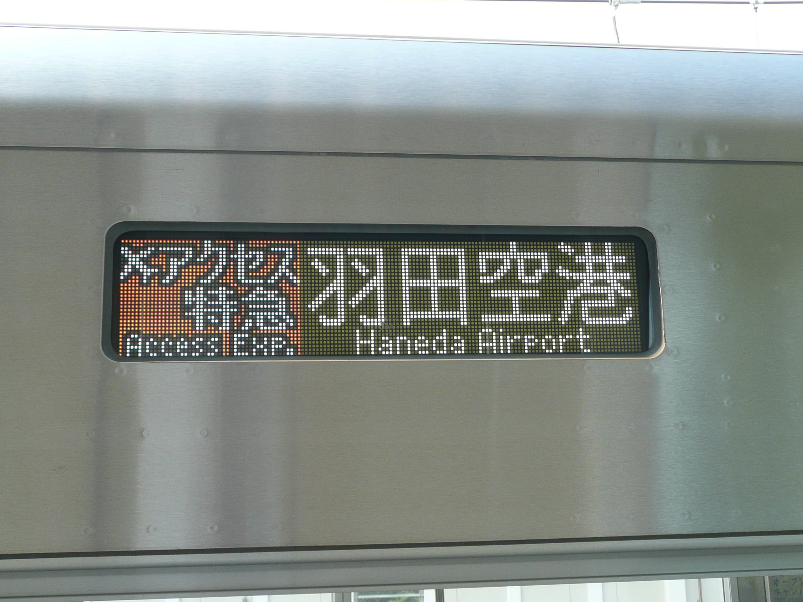 2013年10月まで成田空港発の列車で表示していたもの